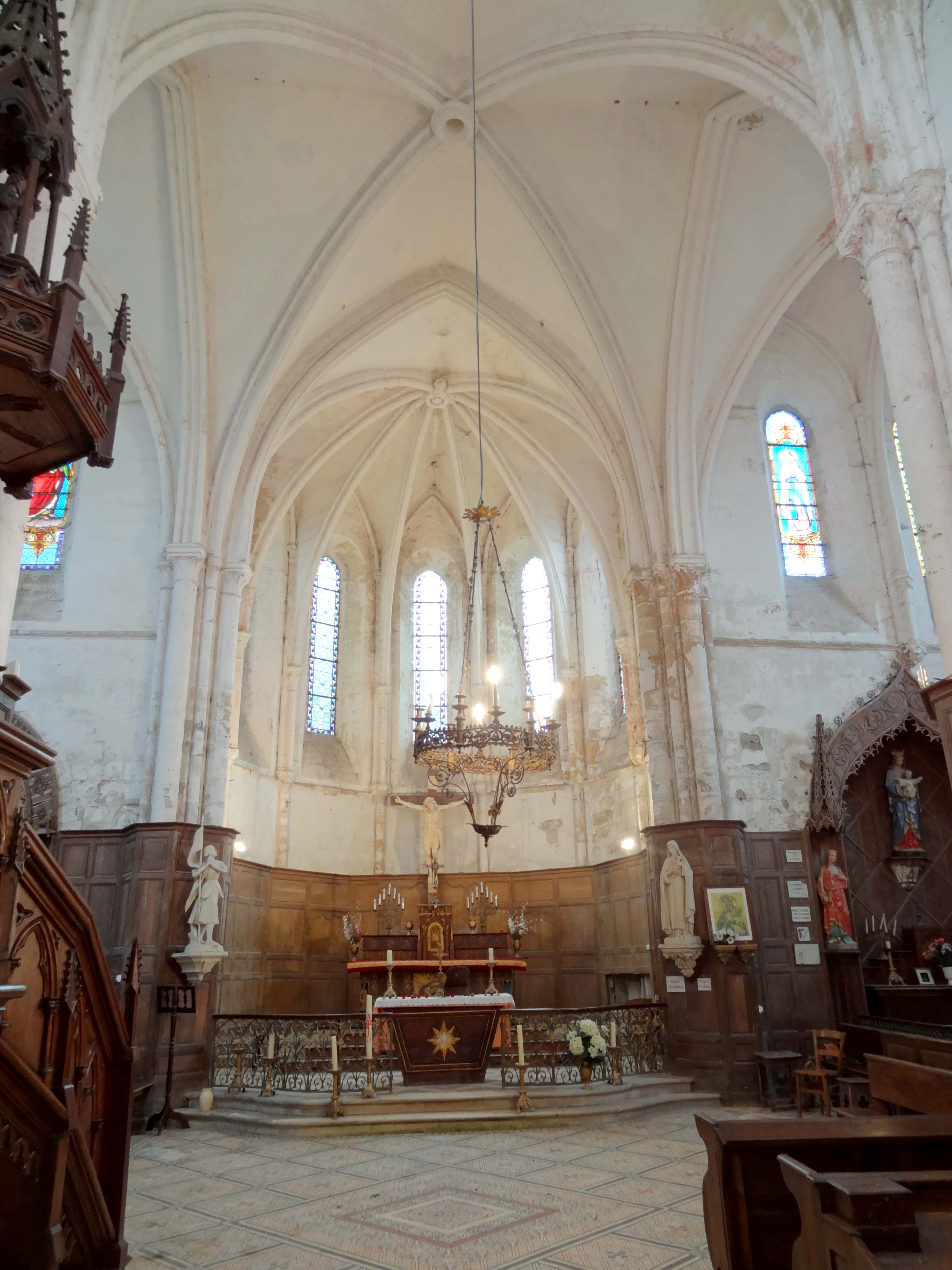 Intérieur de l'église - voir titre.